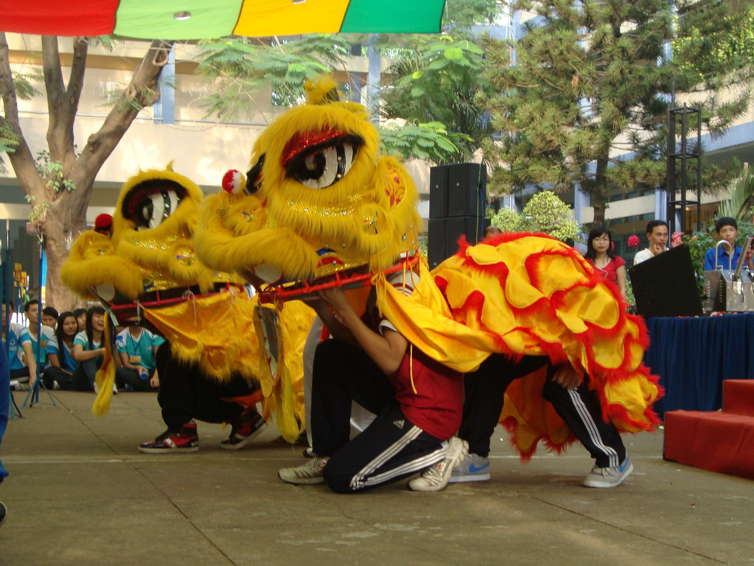 Múa lân trong chương trình biểu diễn văn nghệ, Trại Xuân 2012, THPT Trần Phú TP.HCM